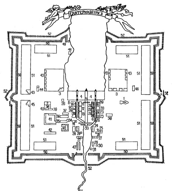 1 — церковь; 2 — Обер-бергамт; 3 — дворы командирские; 4 — плотина; 5 — вешняк; 6 — лари; 7 — домна (две печи); 8 — фурмовая; 9 — свирельная; 10 — плавильная (три печи); 11 — молотовая; 12 — дощатая (три молота); 13 — жестяная (два молота); 14 — лудильная; 15 — укладная (10 горнов); 16 — стальная (три горна); 17 — железорезная (два станка); 18 — проволочная (10 клетей); 19 — пильная (два стана); 20 — якорная (три горна); 21 — колотушка (три молота); 22 — хлебная мельница; 23 — колесницы; 24 — кузница (9 горнов); 25 — «изба железо пробовать»; 26 — весы; 27 — амбары; 28 — меховые; 29 — госпиталь; 30 — «изба лес сушить»; 31 — баня; 32 — платный (монетный) двор; 33 — мосты через вешняки; 34 — обжигальная; 35 — подъездной сарай; 36 — лесные сараи; 37 — рудный сарай; 38 — книгохранилище; 39 — лаборатория; 40 — тюрьма; 41 — гостиный двор; 42 — мелочные ряды; 43 — дворы подъяческие; 44 — школа; 45 — корчмы; 46 — богадельня; 47 — скотобойни; 48 — пивоварня; 49 — пороховой погреб; 50 — крепость; 51 — дворы мастеровых и прочих служителей; 52 — рогатки